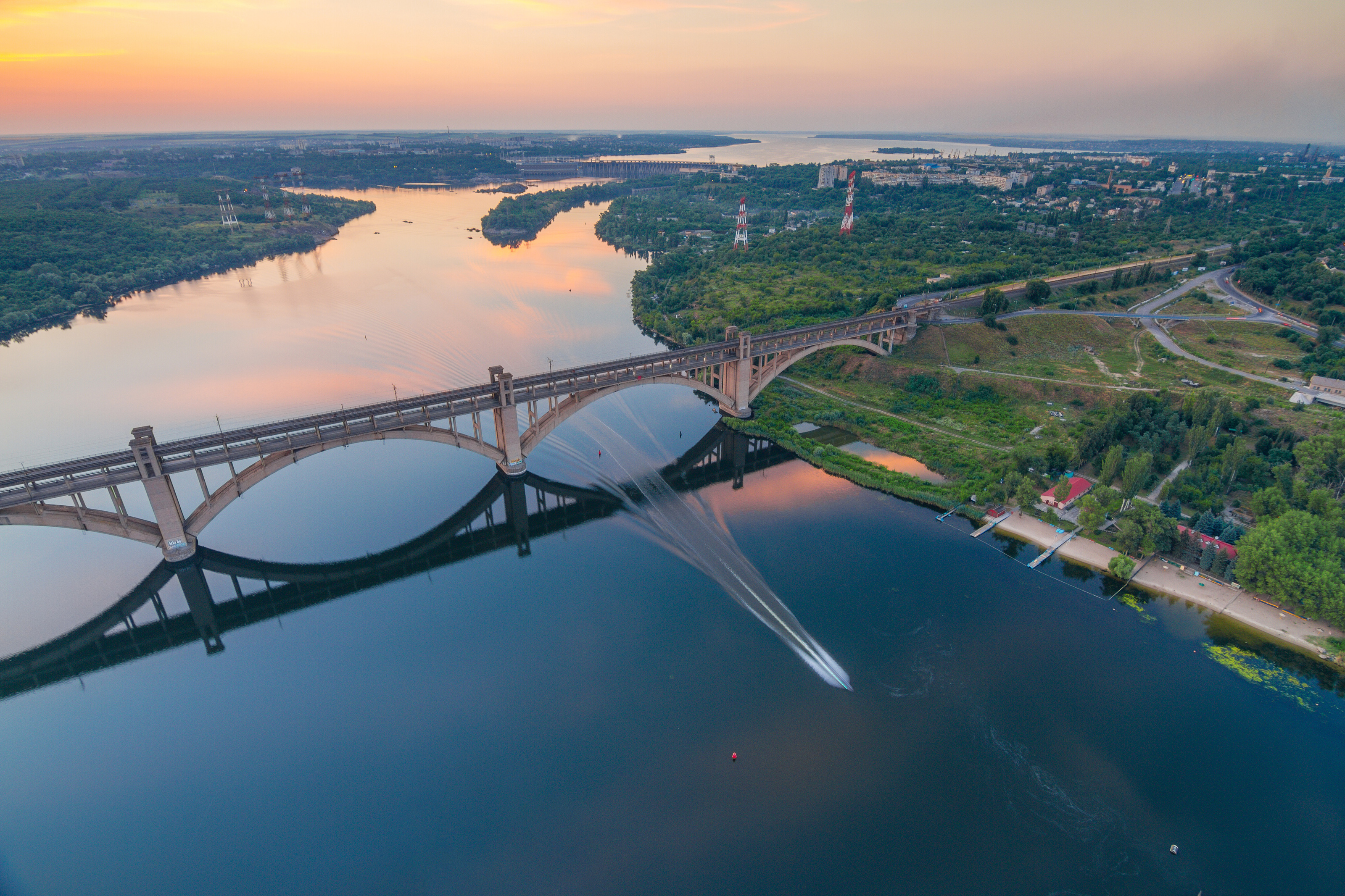 Мости Преображенського, Запоріжжя, р. Дніпро — Старий Дніпро